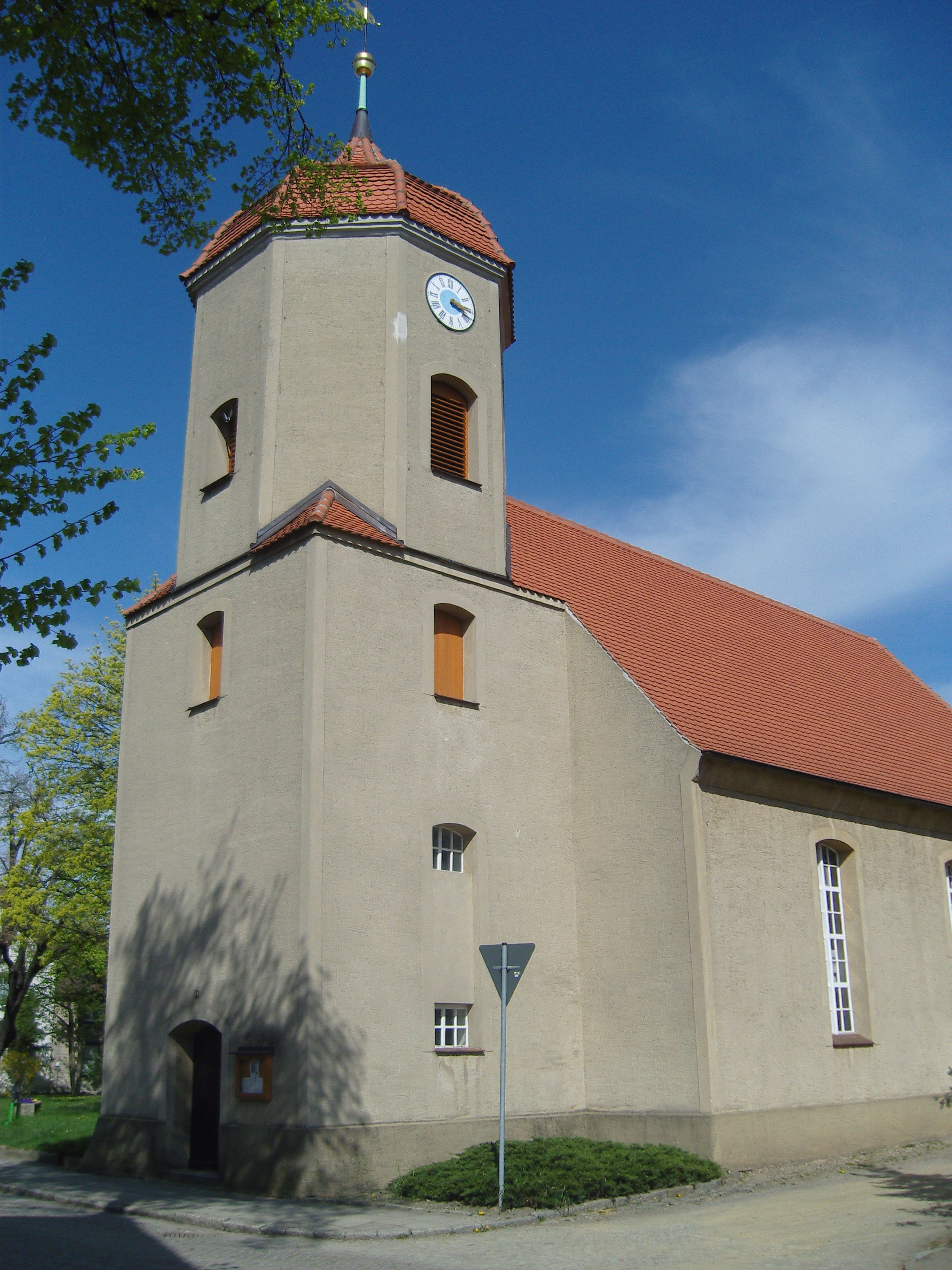 Dorfkirche im Senftenberger Ortsteil Sedlitz